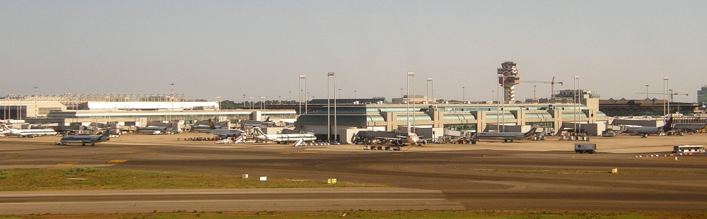 Fiumicino